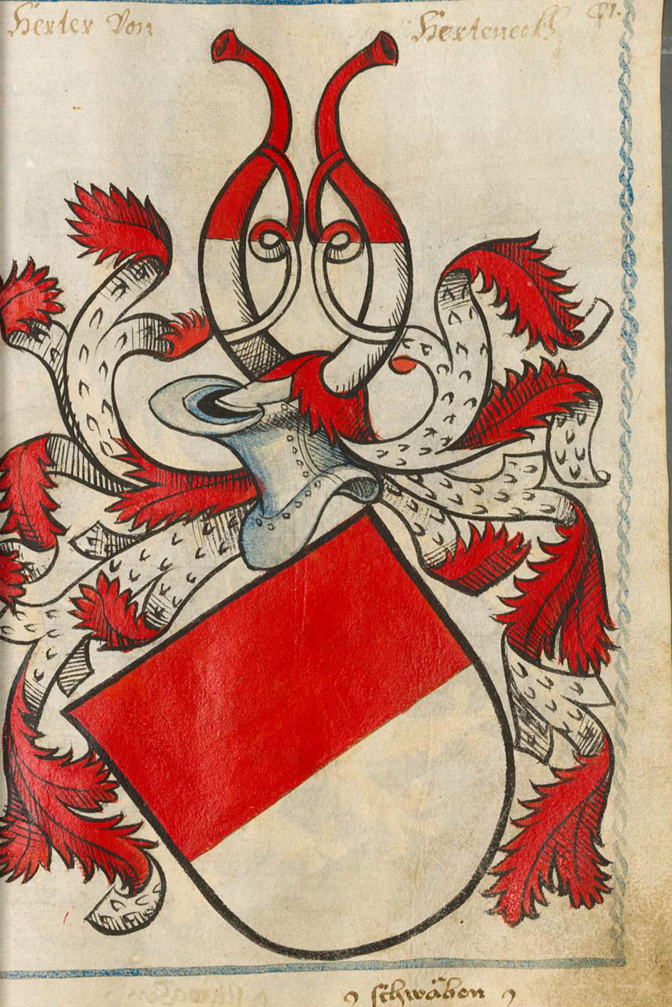 Scheibler'sches Wappenbuch, älterer Teil Herter von Herteneck